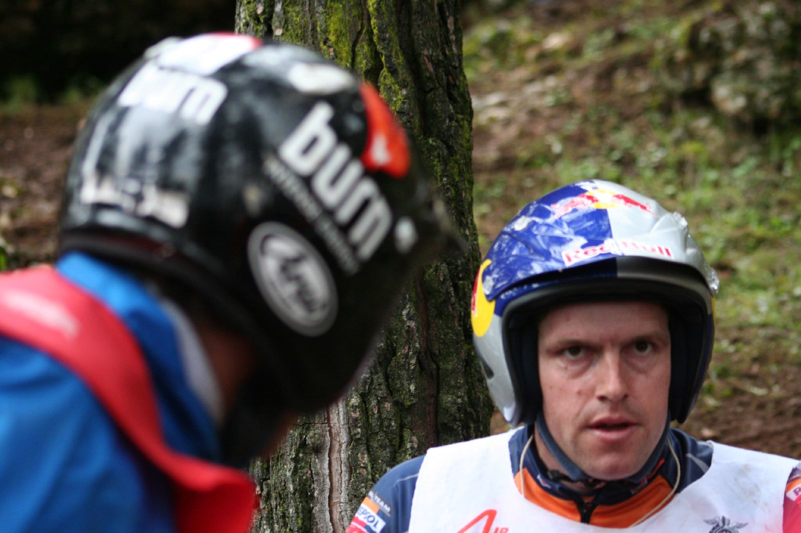 Se hizo bastante daño arriesgando al máximo en la subida, desde luego la zona 2 se confirmó como la más complicada.